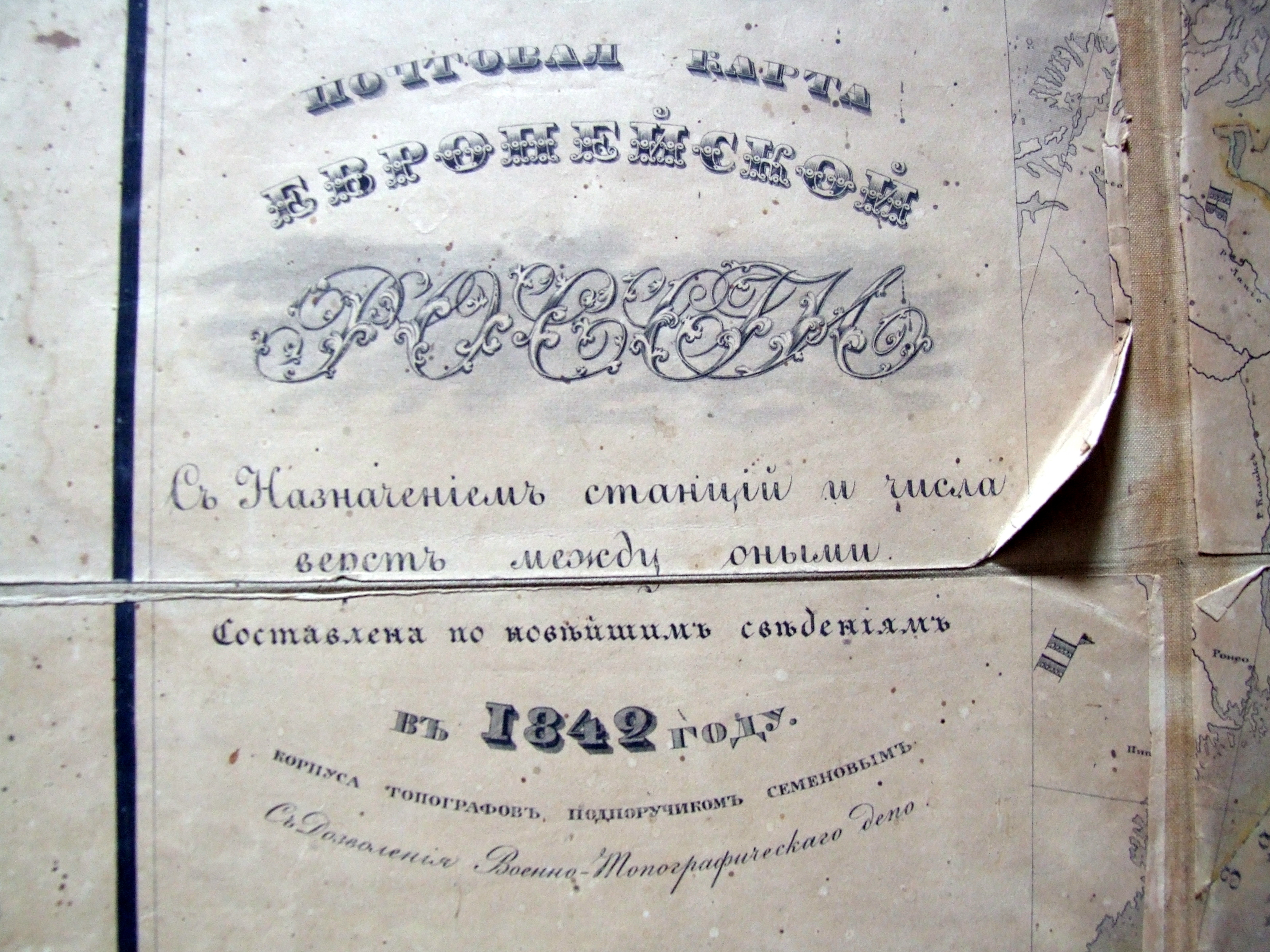 Титульный лист почтовой карты Европейской России